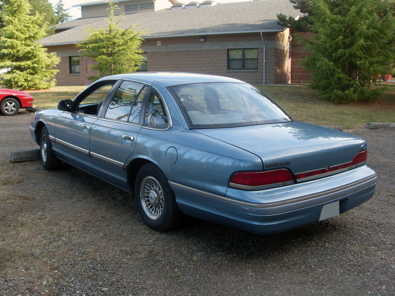 1994 ford crown victoria